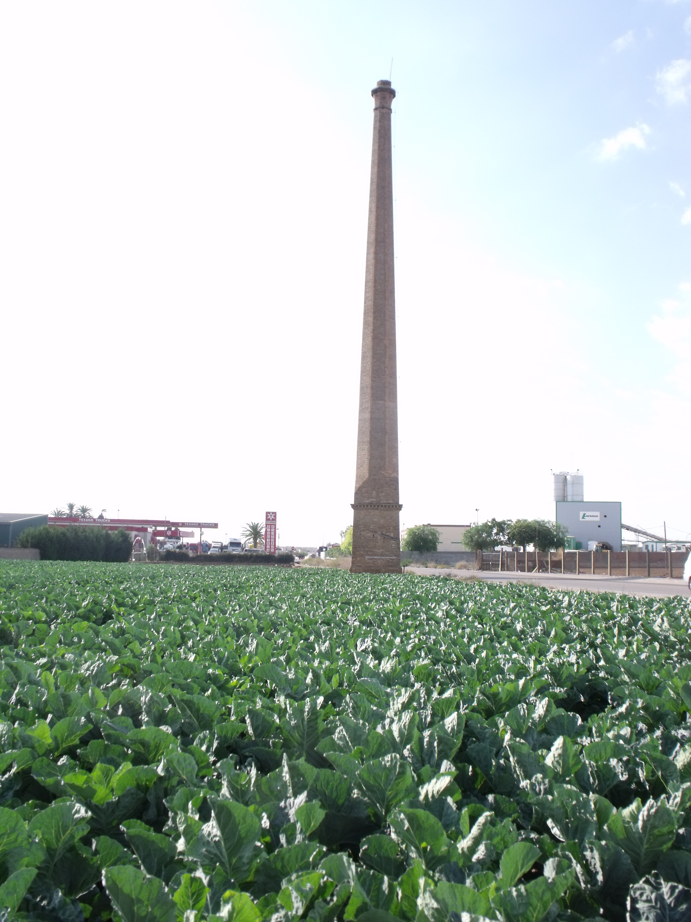 Faitanar: chimenea del Camí de Picassent.